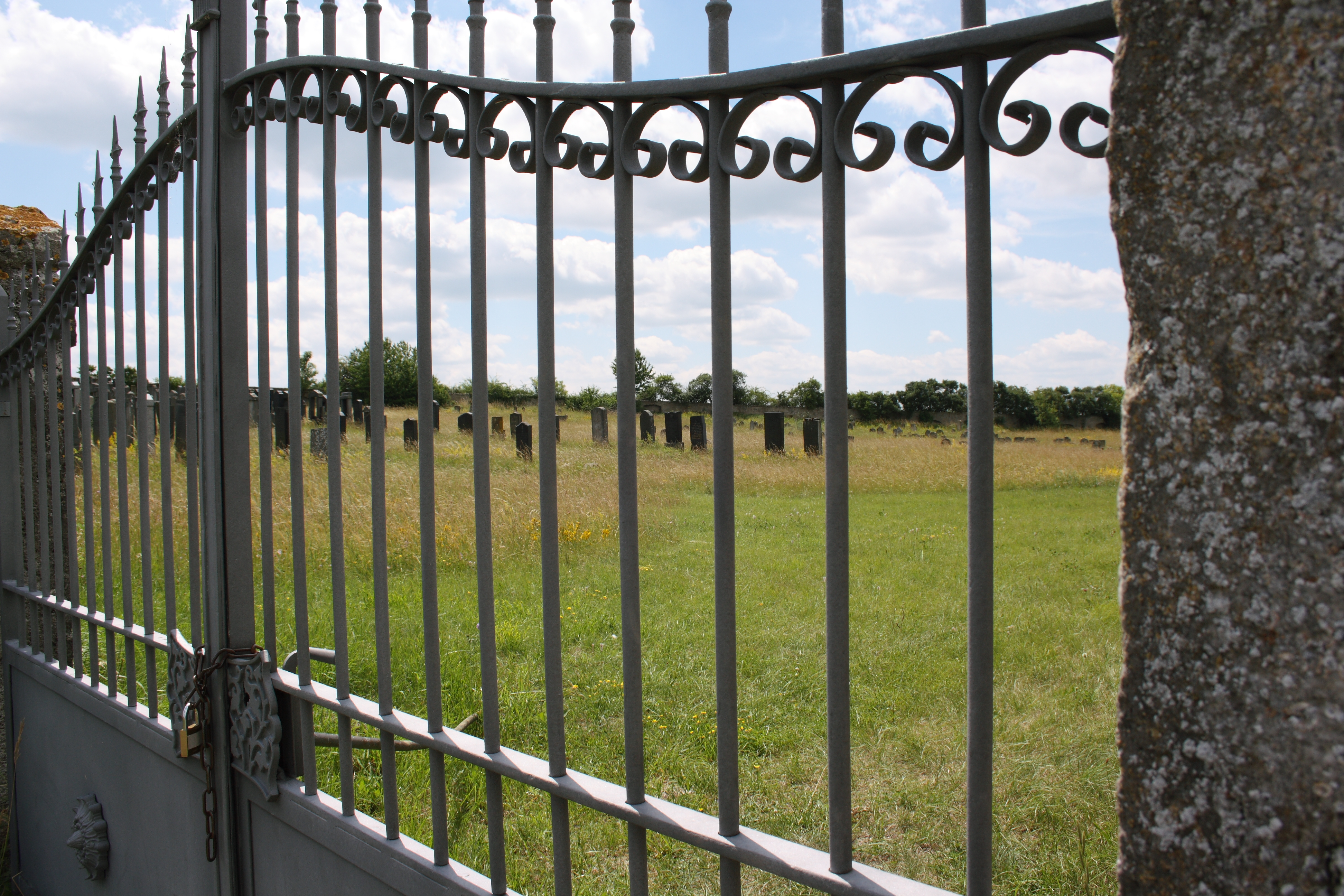 Jüdischer Friedhof in Rödelsee im Landkreis Kitzingen (Bayern)